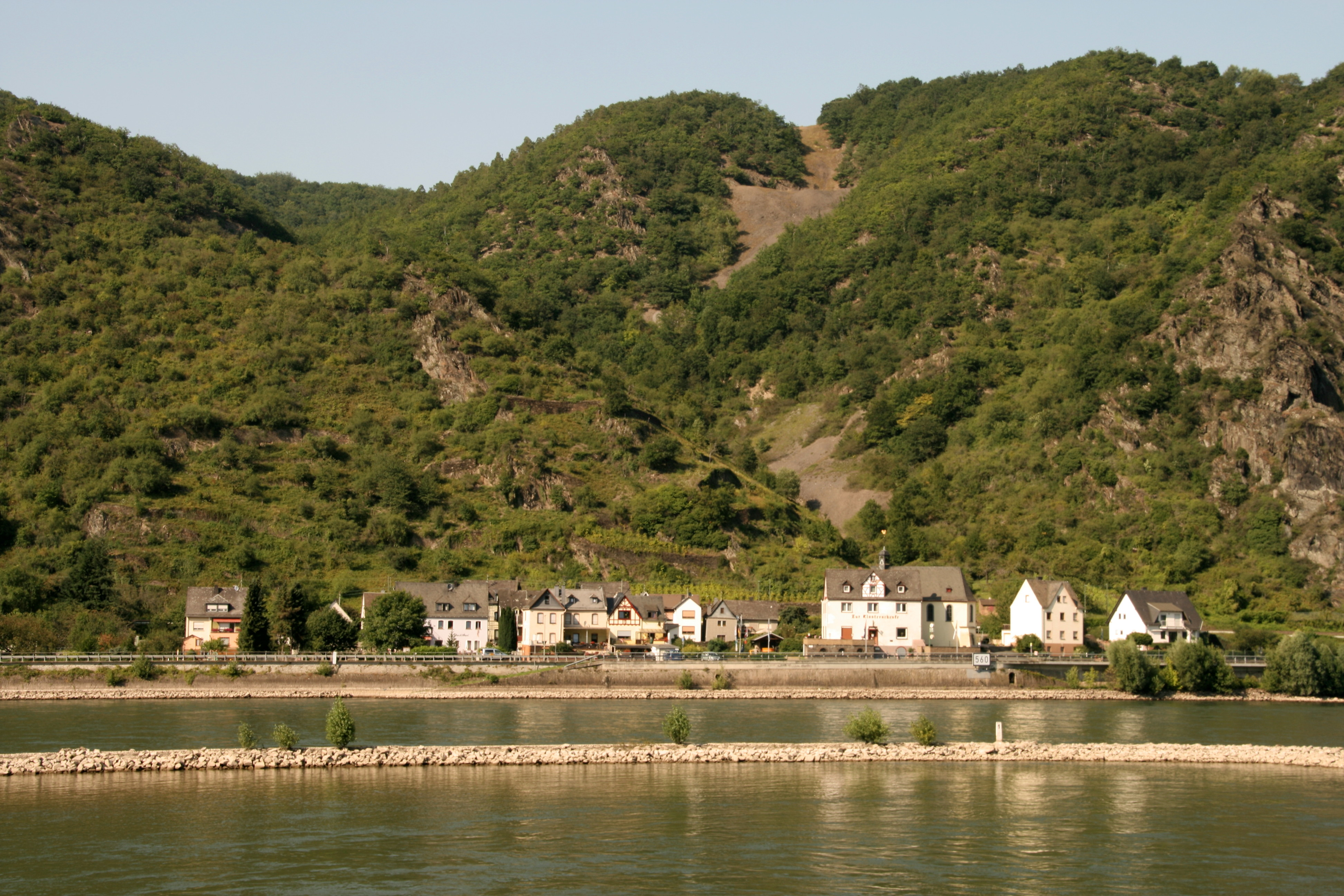 St. Goarshausen-Ehrenthal, darüber die Abraumhalde der ehemaligen Grube Gute Hoffnung, Rheinland-Pfalz.